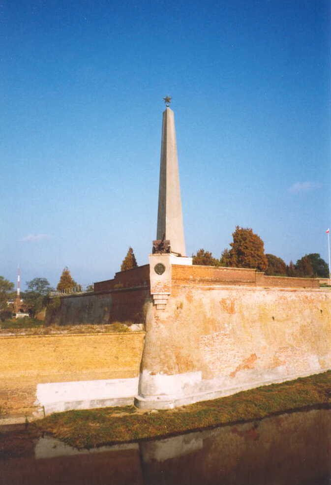 Festung Küstrin (Blick auf die Reste von der Oderbrücke aus) selbst fotografiert (Mazbln) am 26. MÃ¤rz 2004